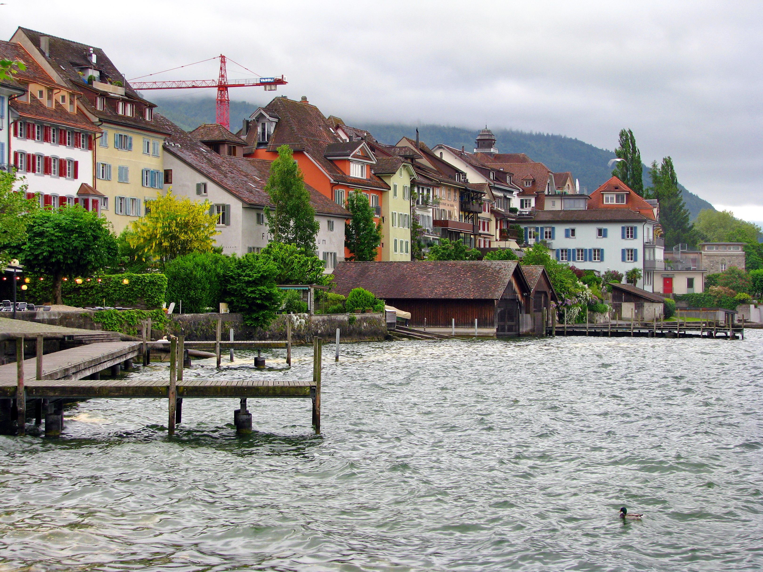 Unterstadt in Zug (Switzerland) as seen from Zugersee harbour